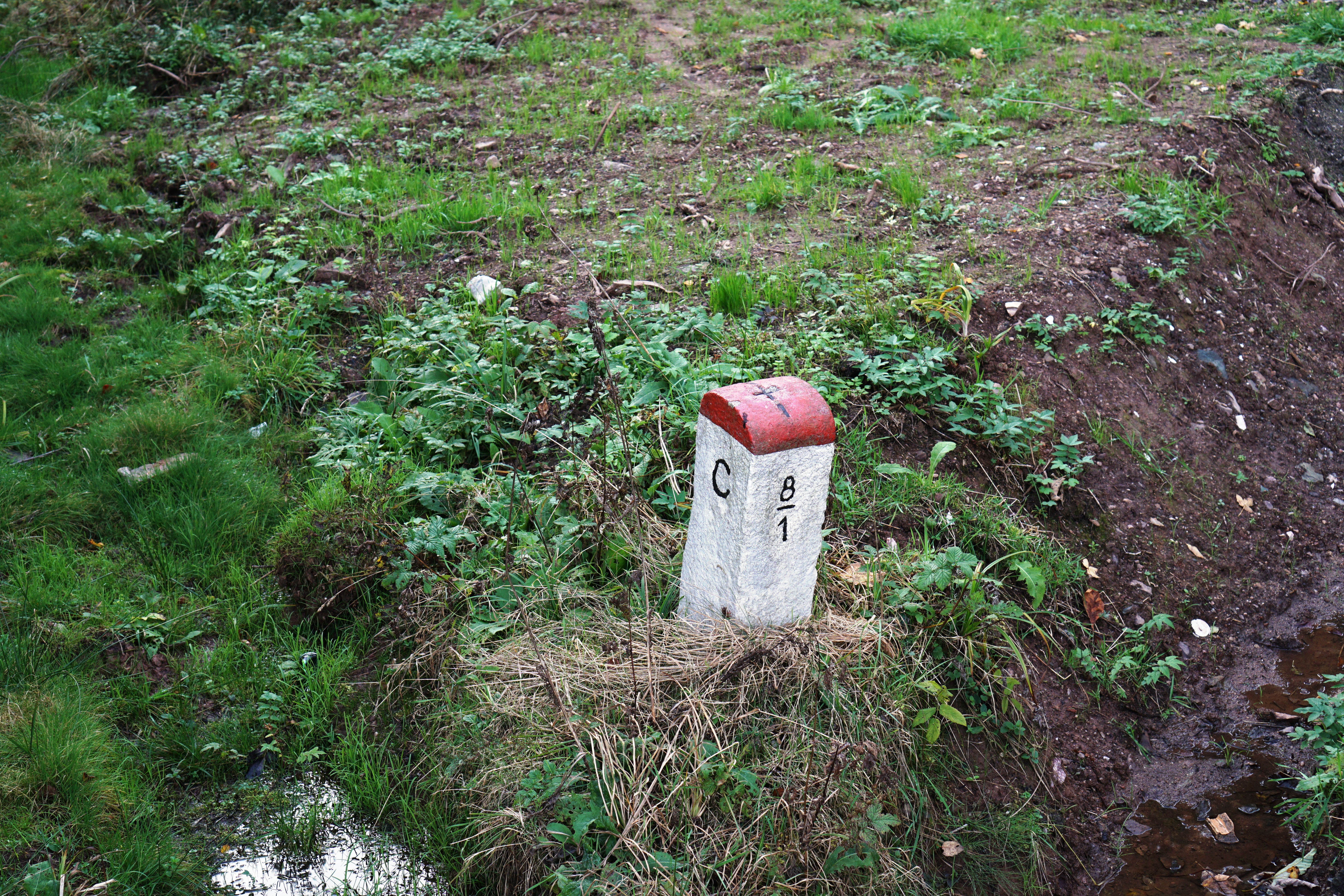 Przejście graniczne Niedamirów-Žacléř - październik 2014